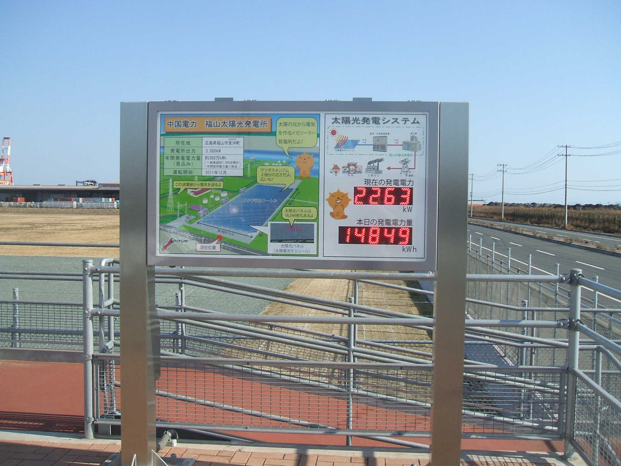 広島県福山市箕沖町にある中国電力福山太陽光発電所の発電量を表示するパネル